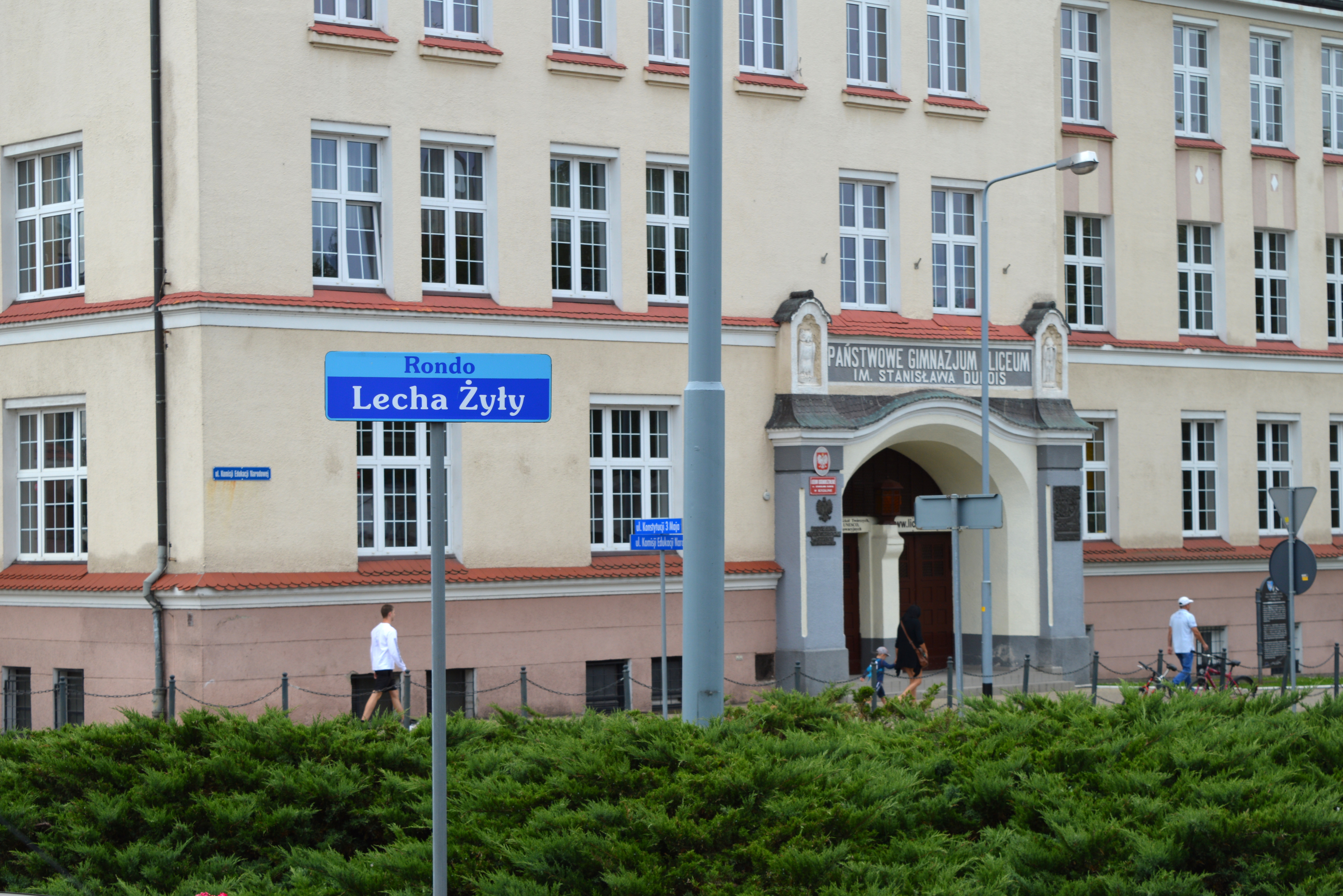 Rondo im. Lecha Żyły, Koszalin